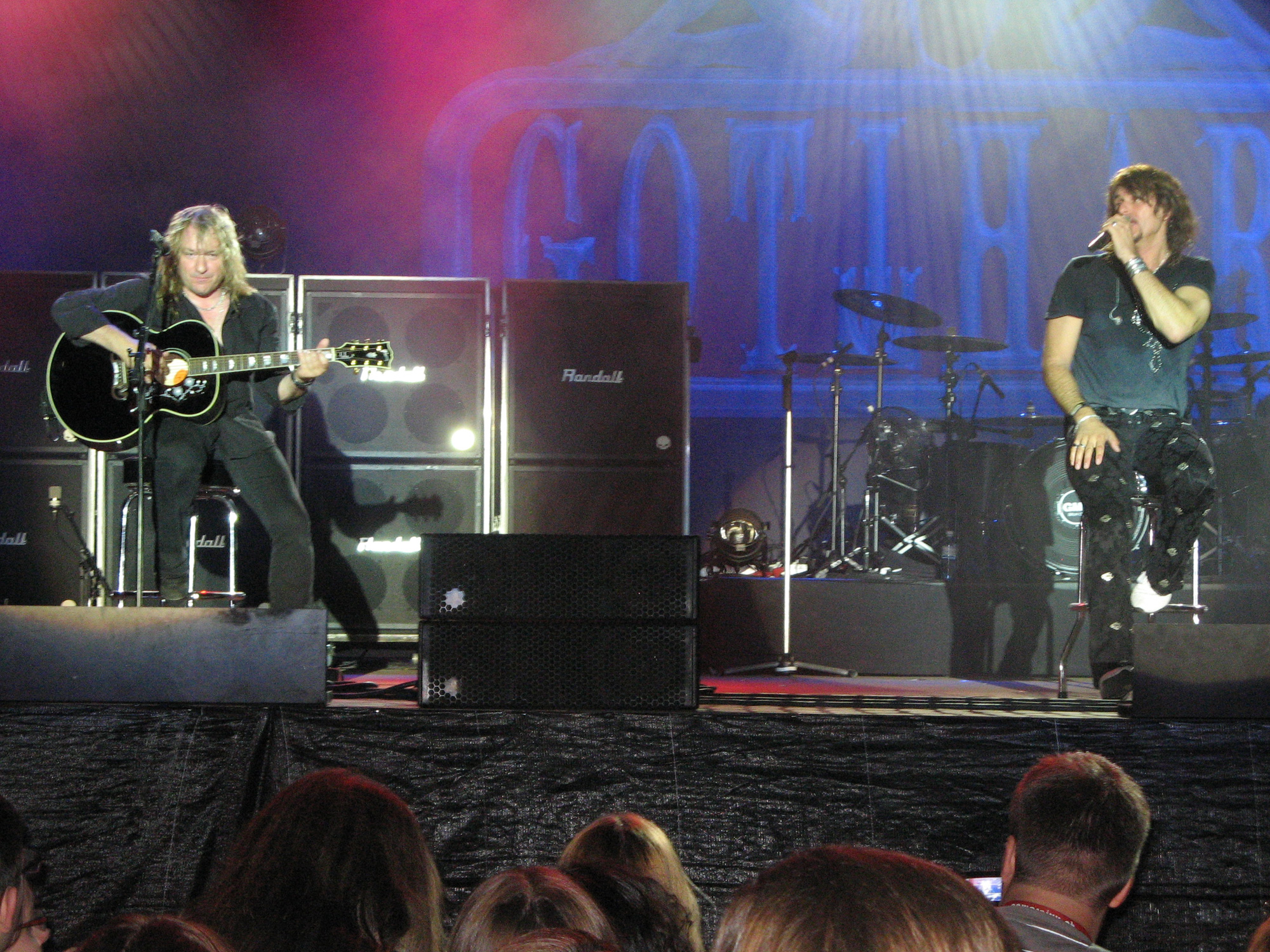 Leo Leoni (links) und Steve Lee (rechts) von Gotthard. Aufgenommen am Radio Argovia Fäscht 2010 beim Flugplatz Birrfeld in Lupfig.